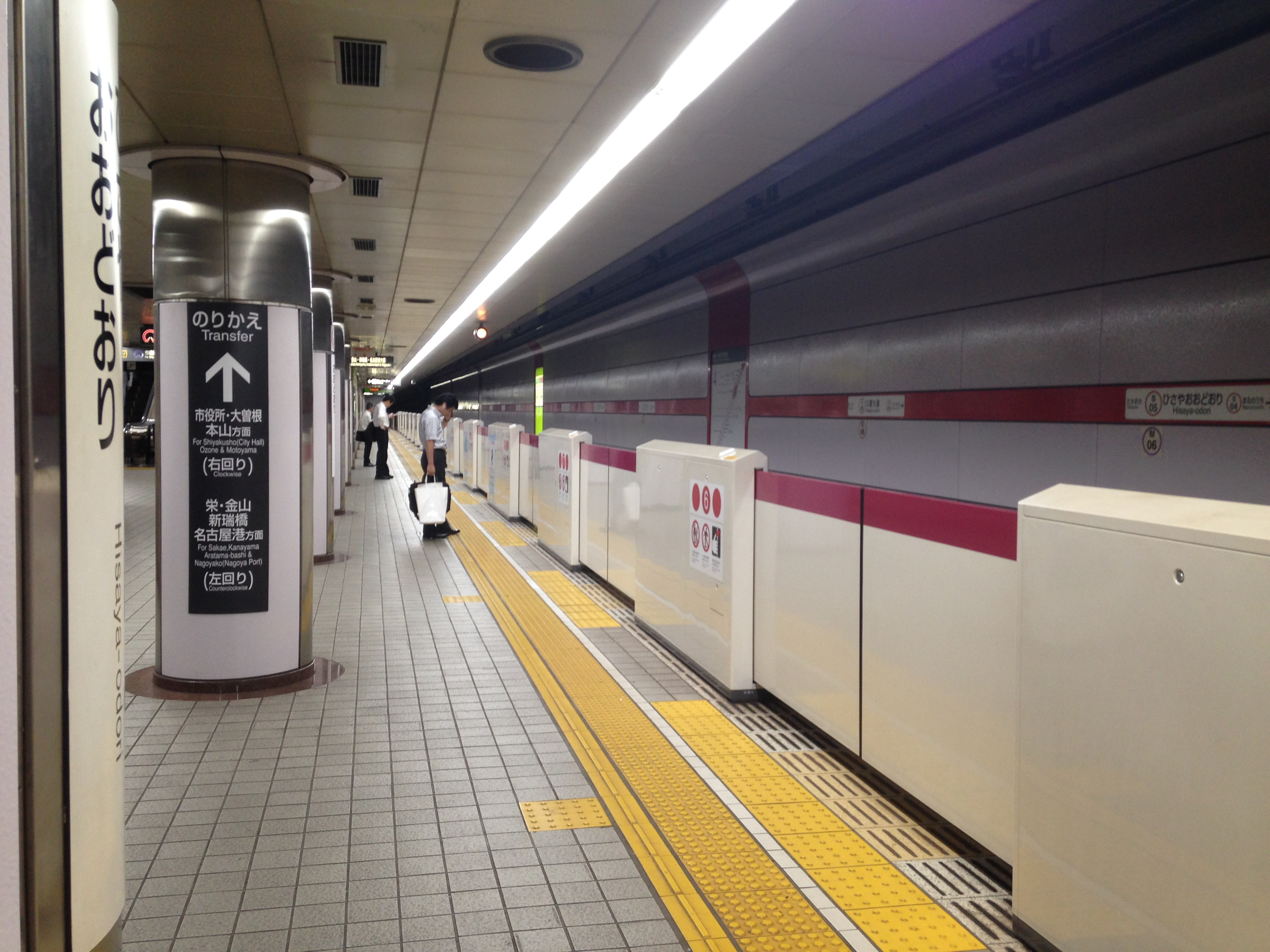 久屋大通駅(桜通線)のホーム